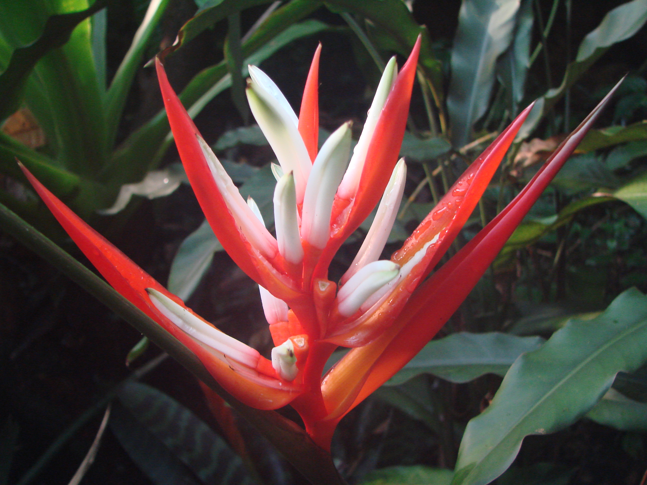 Jardin botanique de l'Université de Zurich (Suisse) : Heliconia angusta